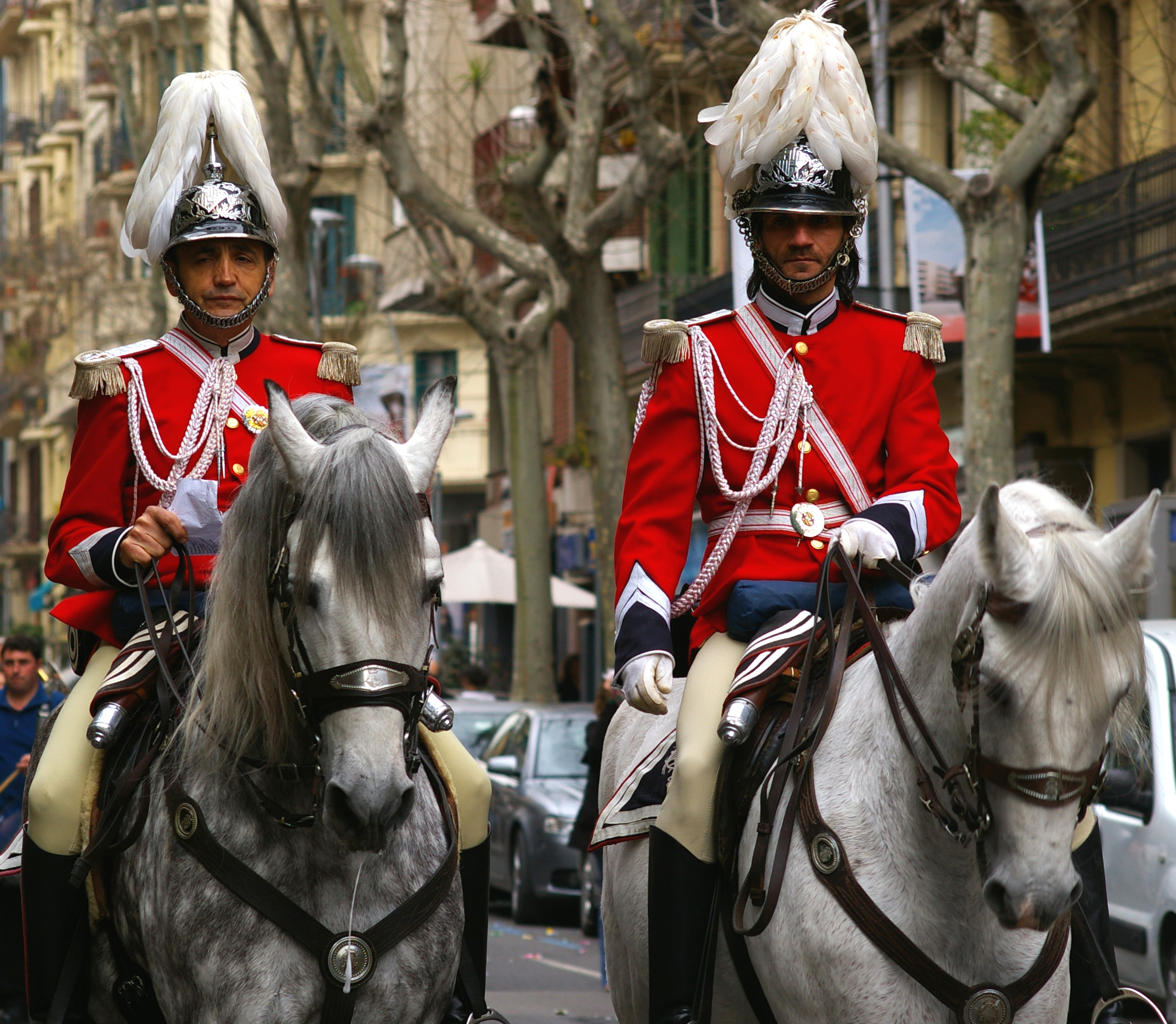 Unitat Muntada de la Guàrdia Urbana de Barcelona (Catalunya).